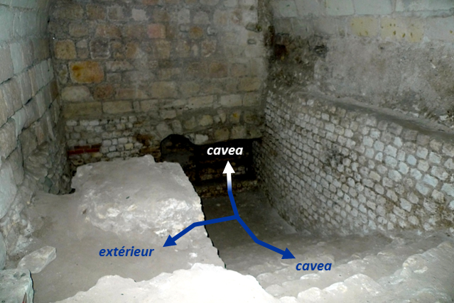 Accès secondaire à la cavea d'après une photo de François Rialland